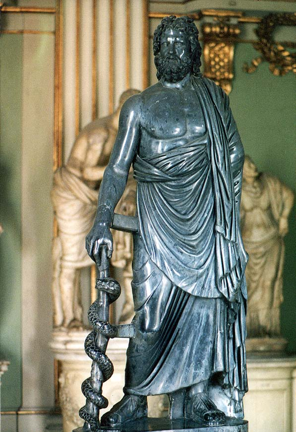 Esculapio ai Musei Capitolini di Roma